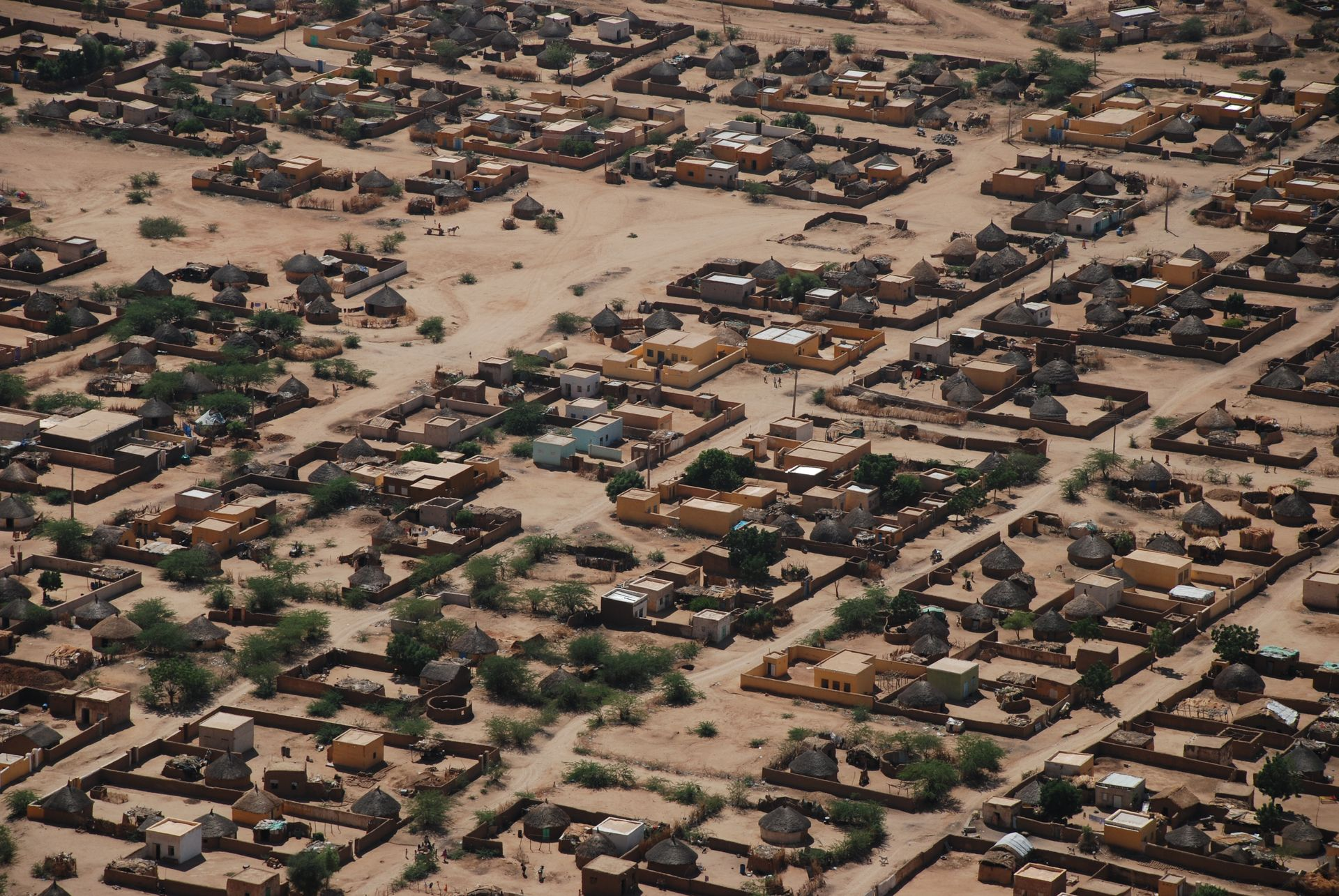 Kassala, suburb near Mukram mountain, Sudan